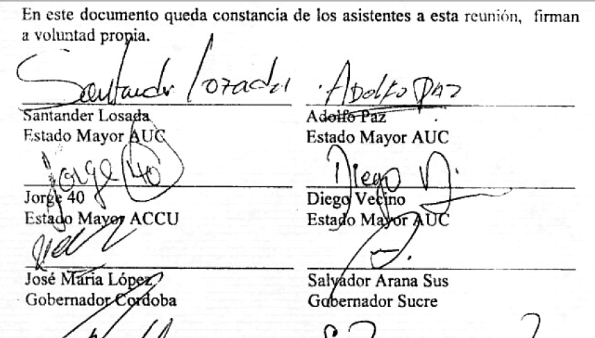 Escaneo de un fragmento del documento del , documento clandestino que no tiene bases legales por pertenecer al grupo armado ilegal .